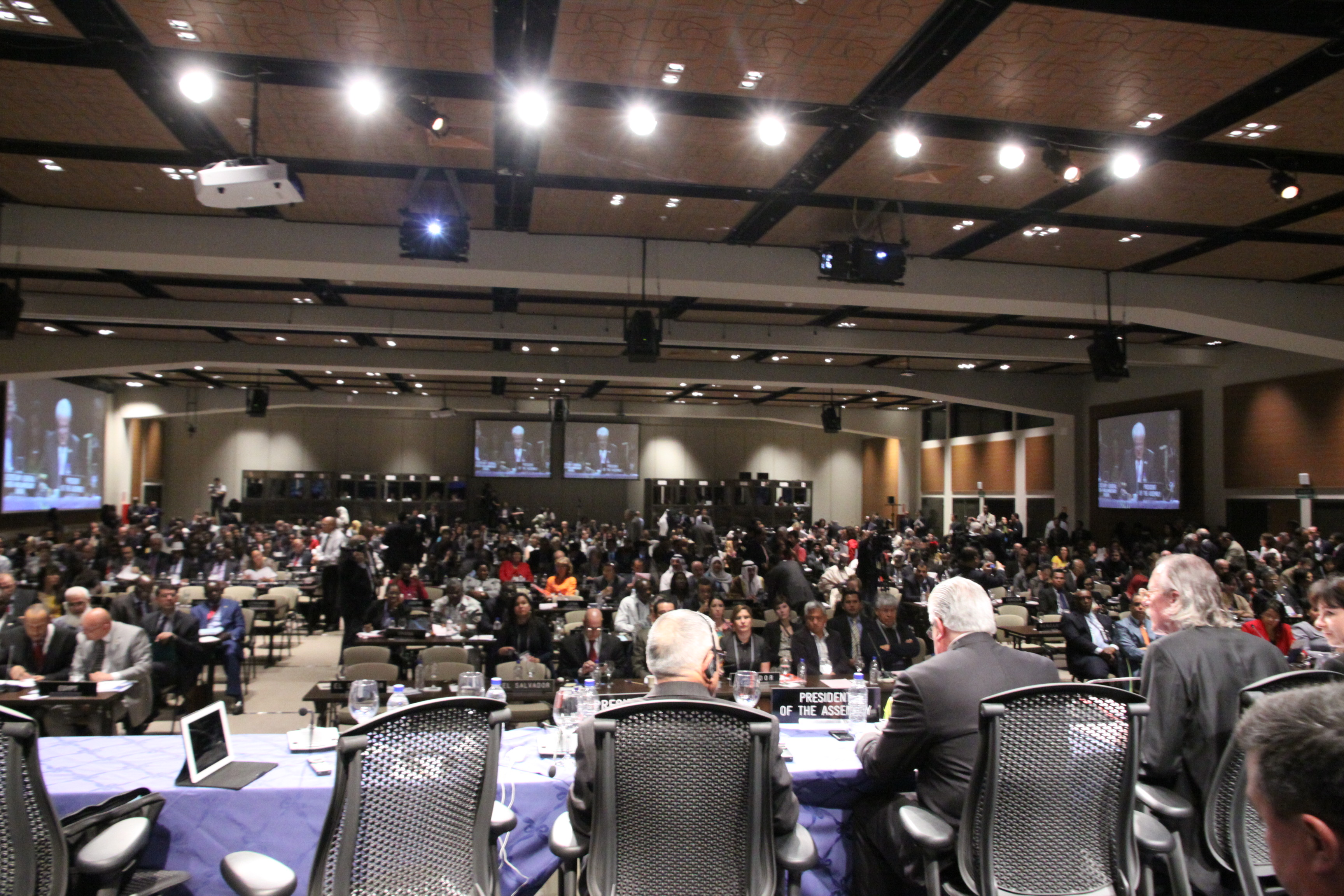 Foto: Hugo Ortiz Ron / Asamblea Nacional